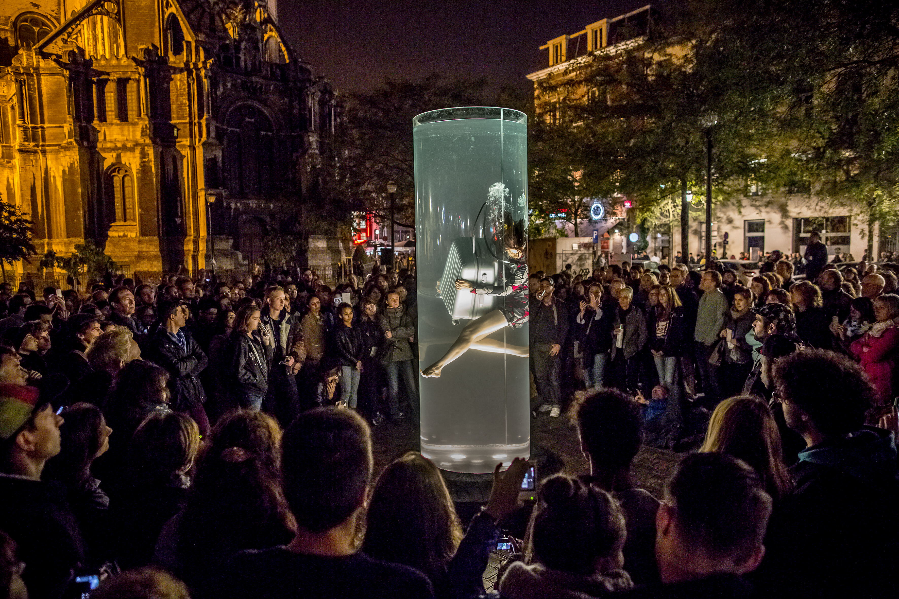 Spectacle pendant l'édition 2015 de Nuit Blanche à Bruxelles. Photo par Jorg Muller Noustube © Eric Danhier